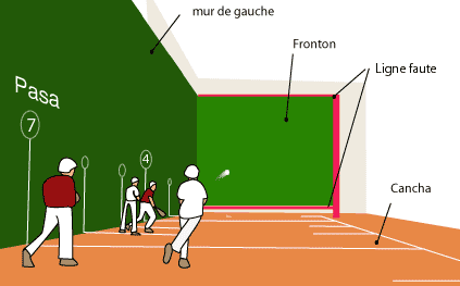 Originally uploaded to french wikipedia: 20 septembre 2005 à 02:16 utilizateur:Jeanbaptisteced Création personnel Sématisation Cancha mur à gauche.